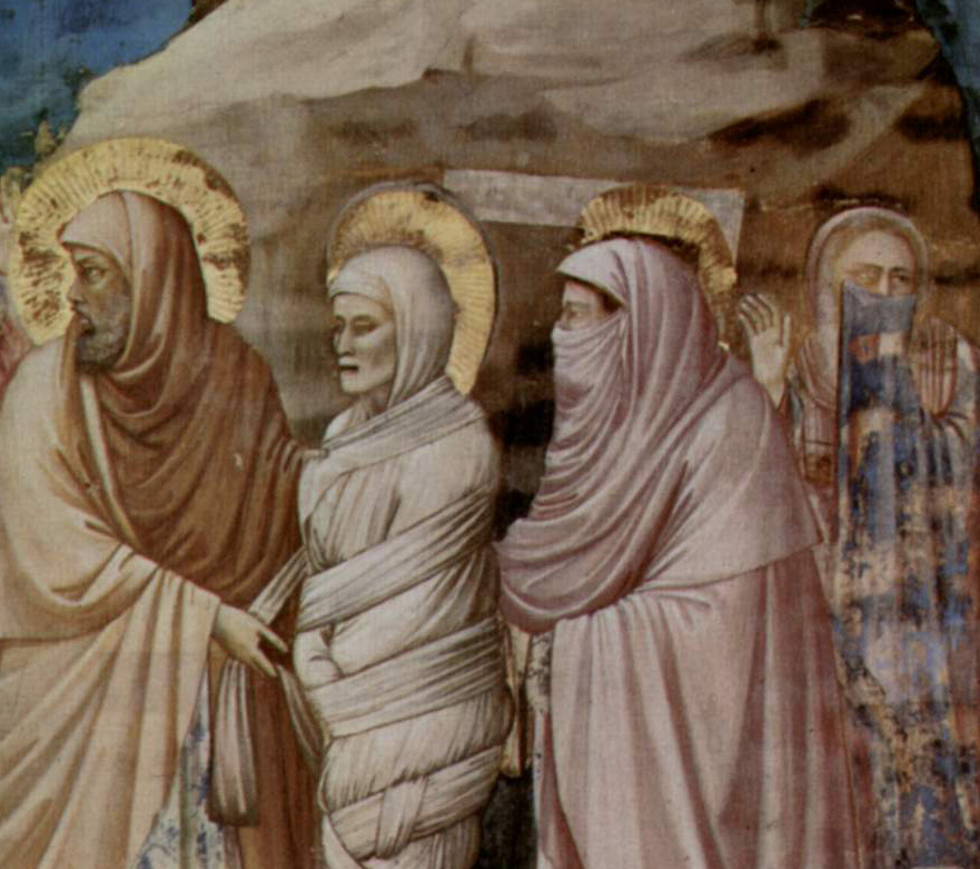 Detalle de Lázaro de la Resurrección de Lázaro de la capilla de los Scrovegni en Padua.Italia